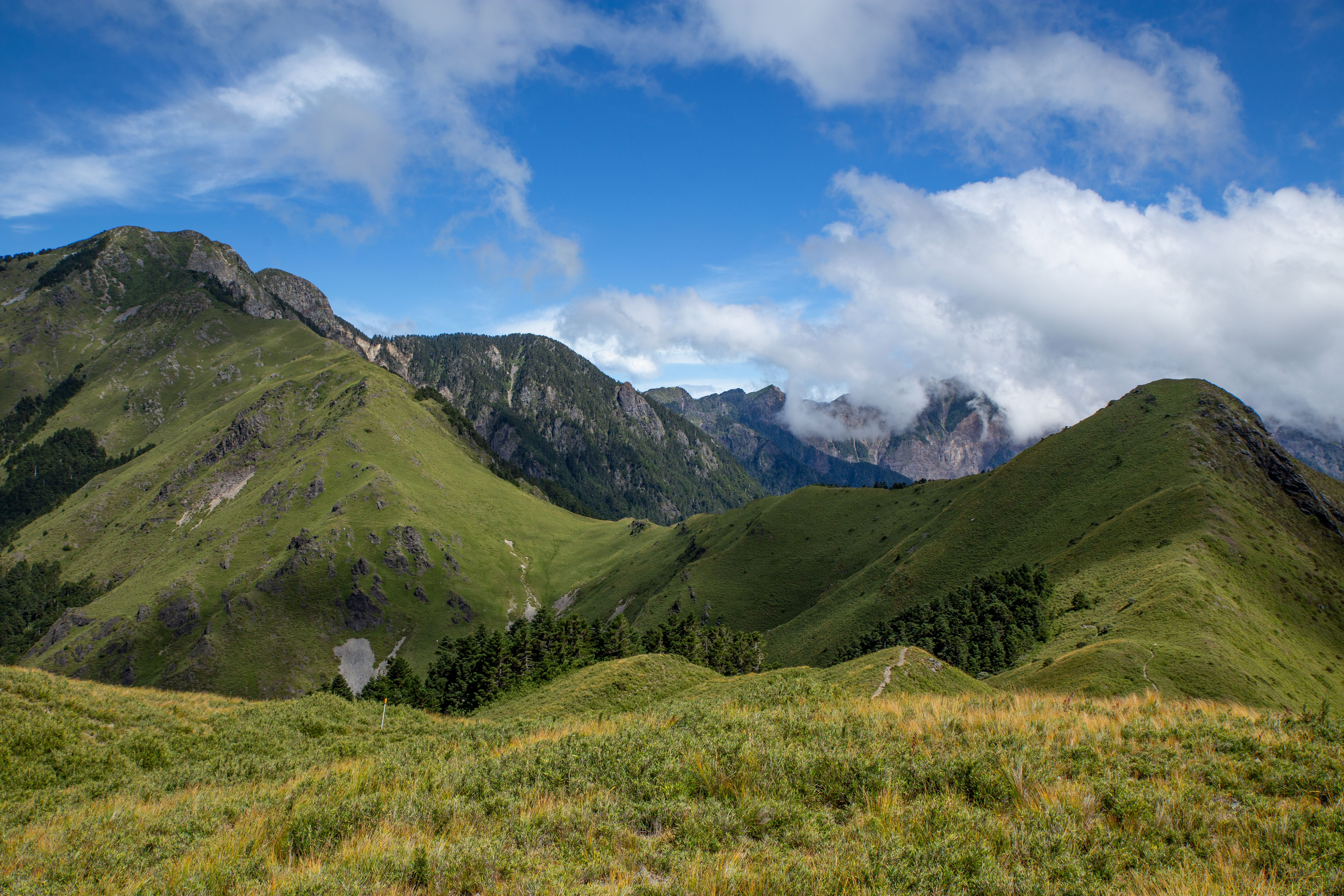 自油婆蘭營地觀看大劍山稜脈